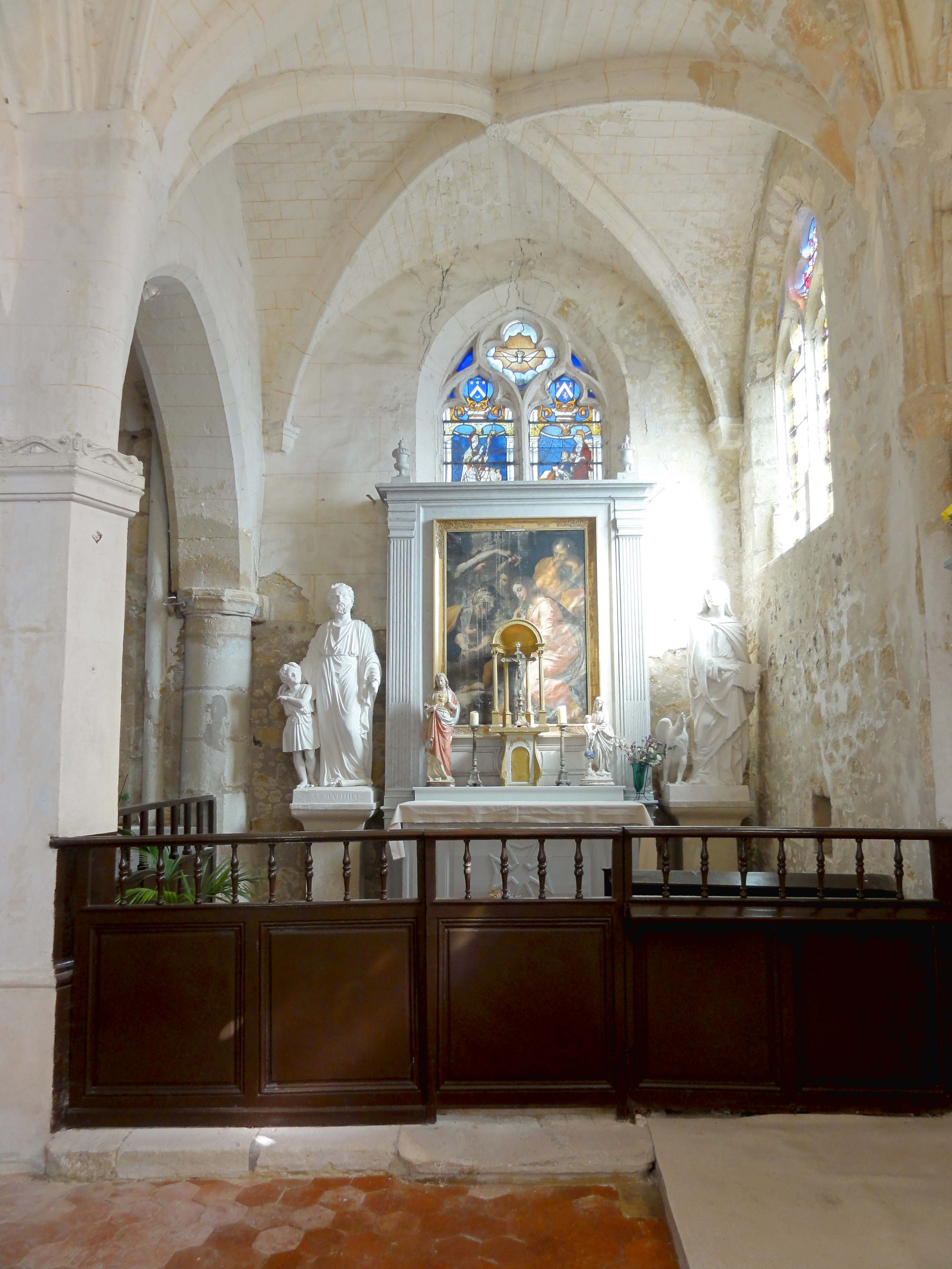 Intérieur de l'église - voir titre.